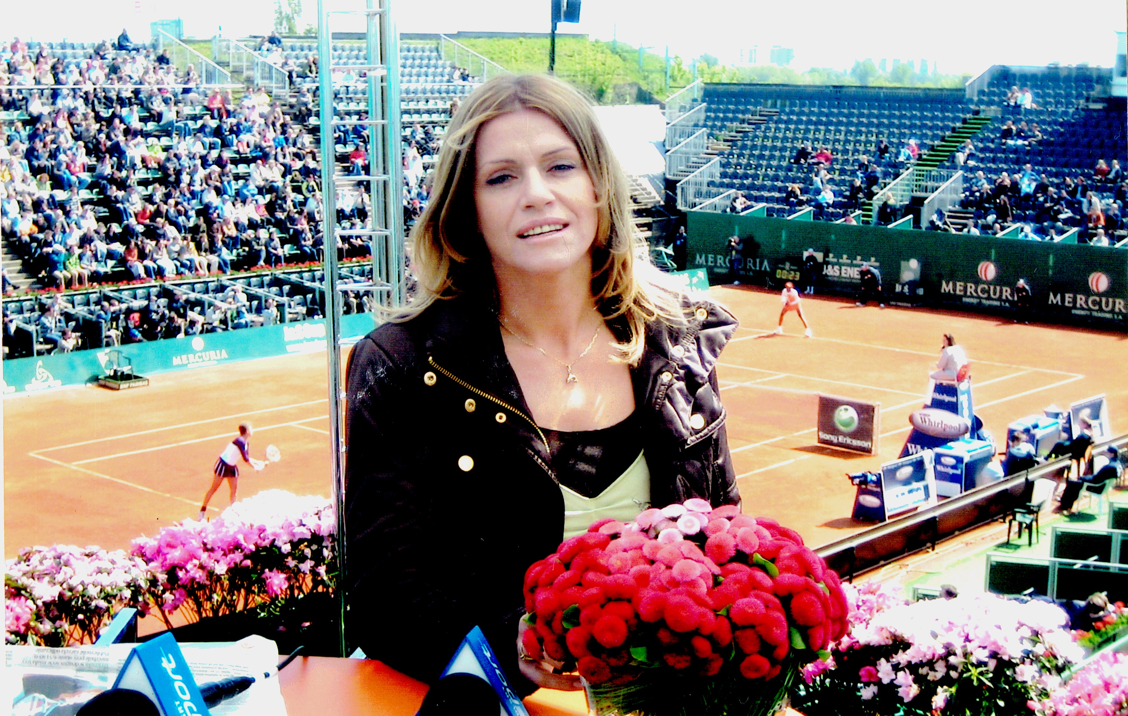 Katarzyna Nowak w roli komentatorki, archiwum prywatne